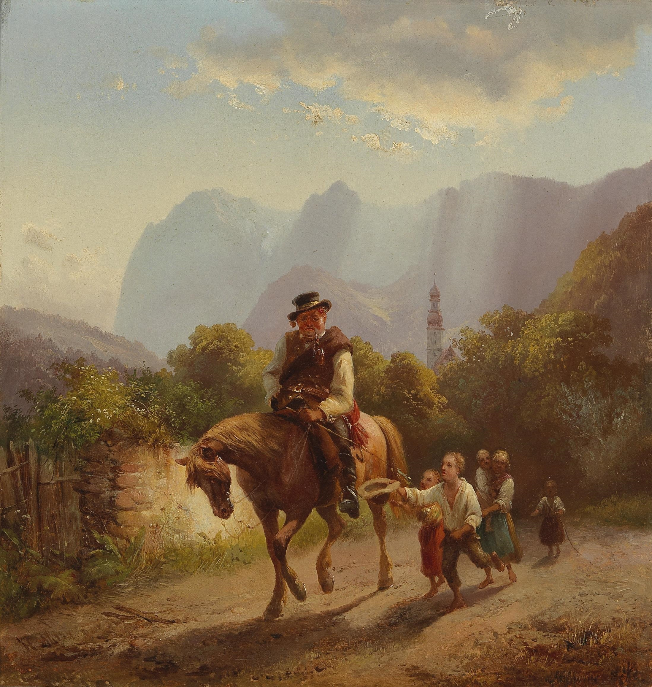 Bettler, der um Almosen bittet